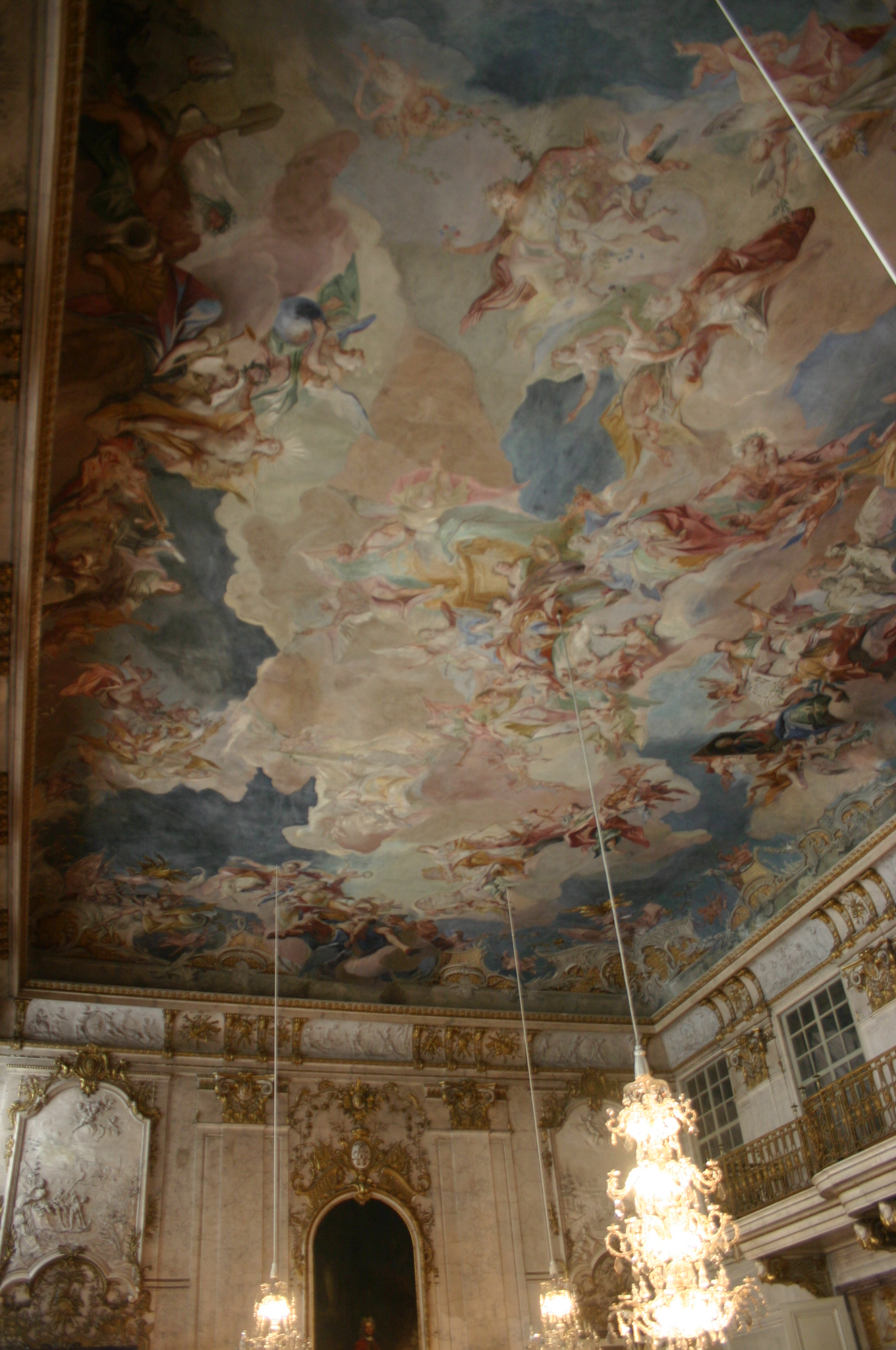 Festsaal der Residenz Ansbach